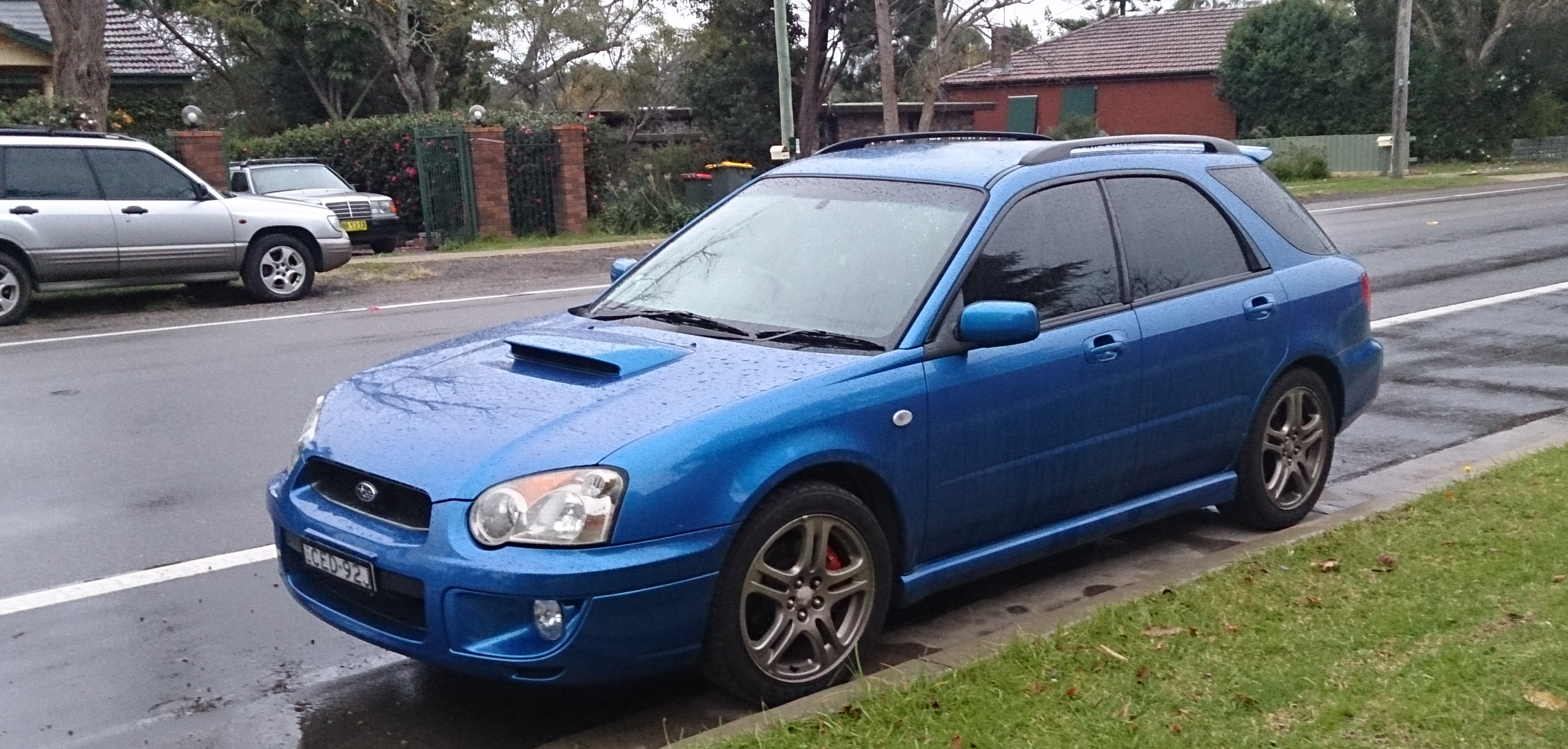 Subaru Impreza WRX Sportwagon